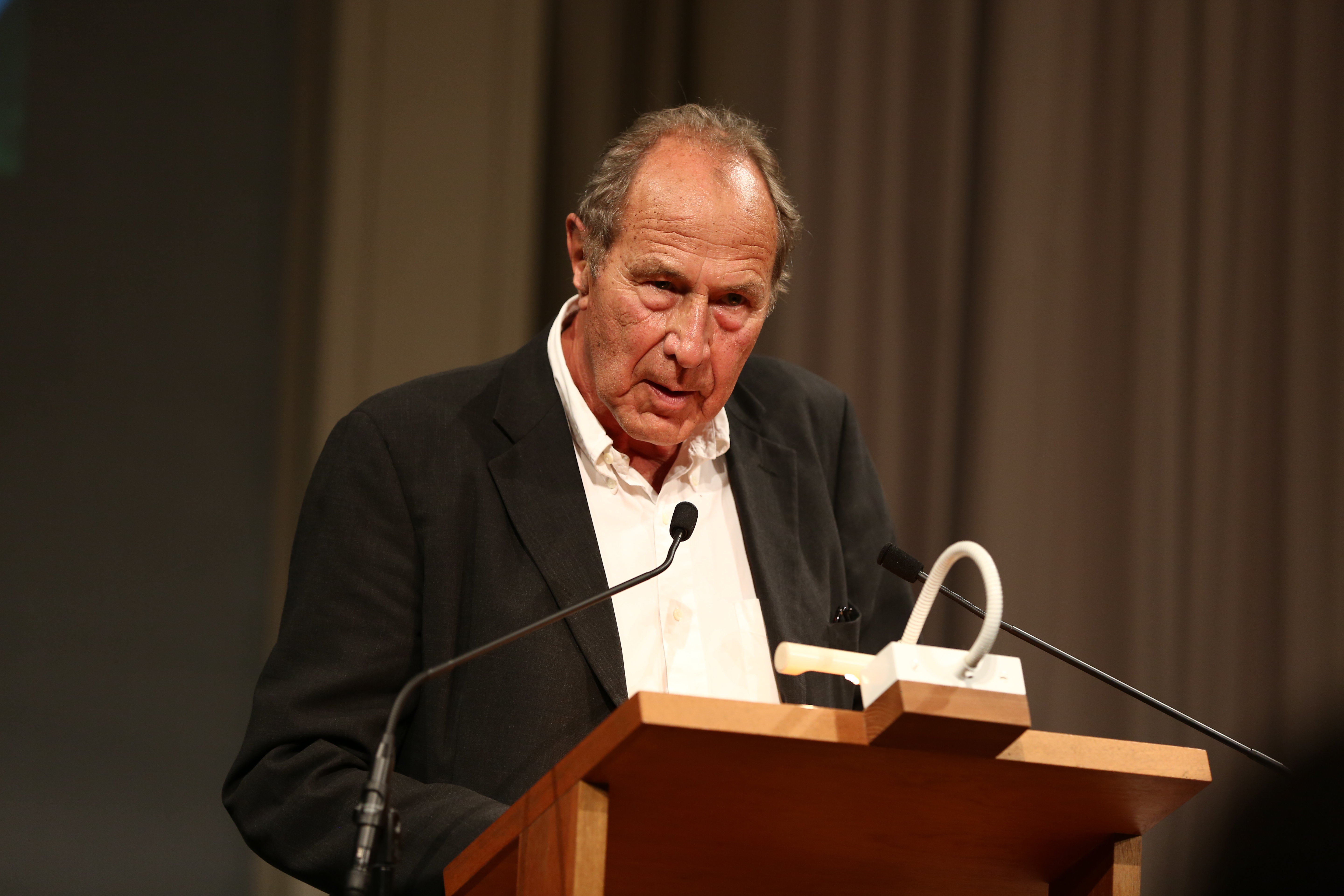 Michael Krüger, Präsident der Bayerischen Akademie der Schönen Künste Verleihung des Thomas-Mann-Preis_2017 der Hansestadt Lübeck und der Bayerischen Akademie der Schönen Künste an Brigitte Kronauer. 18. Oktober 2017 in der Münchner Residenz.